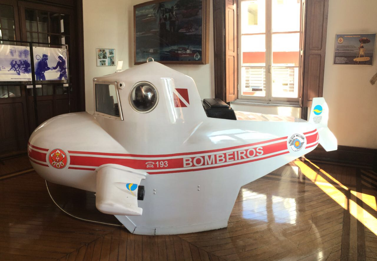 sala do centro de memórias